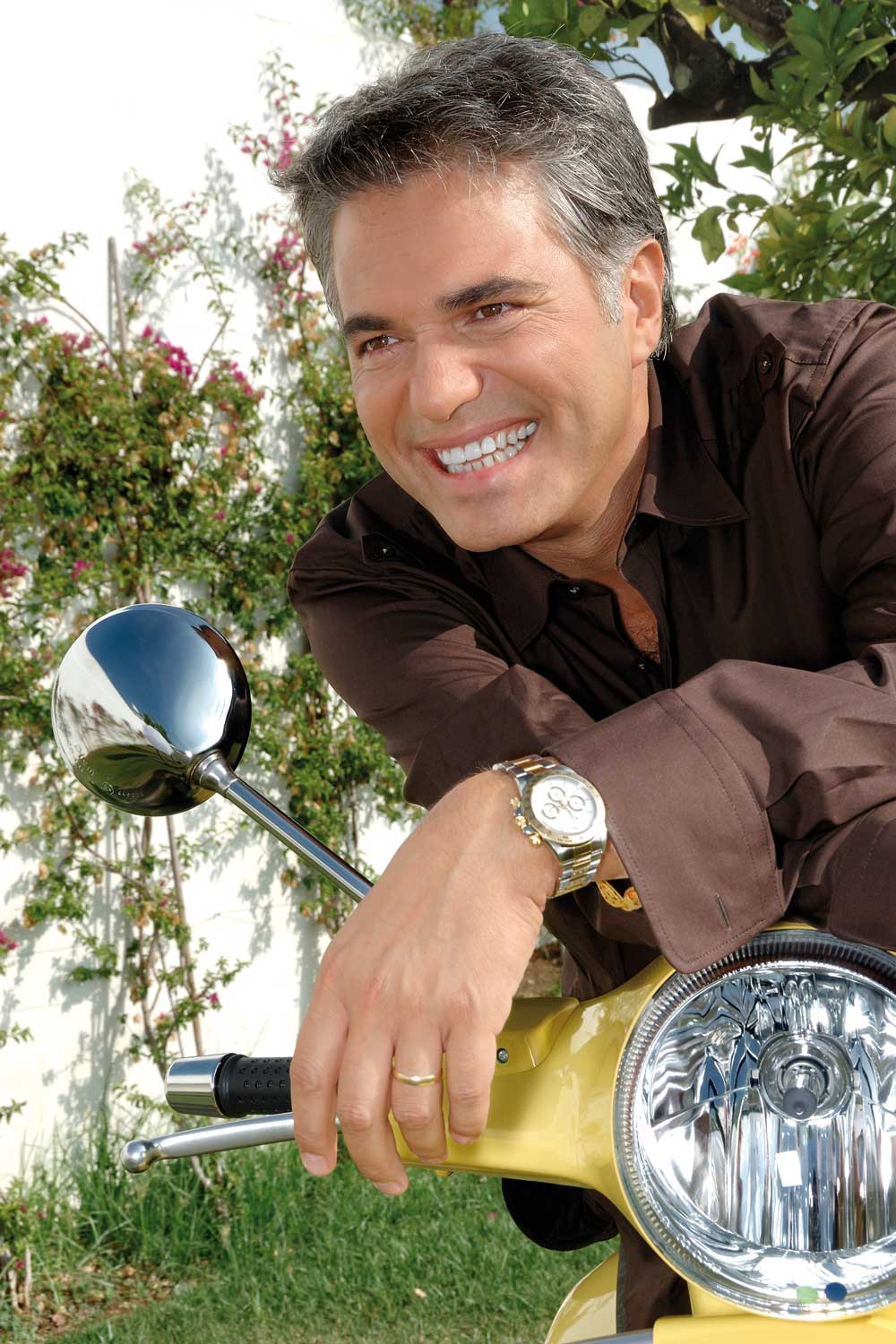 Imagen del presentador español Agustín Bravo.